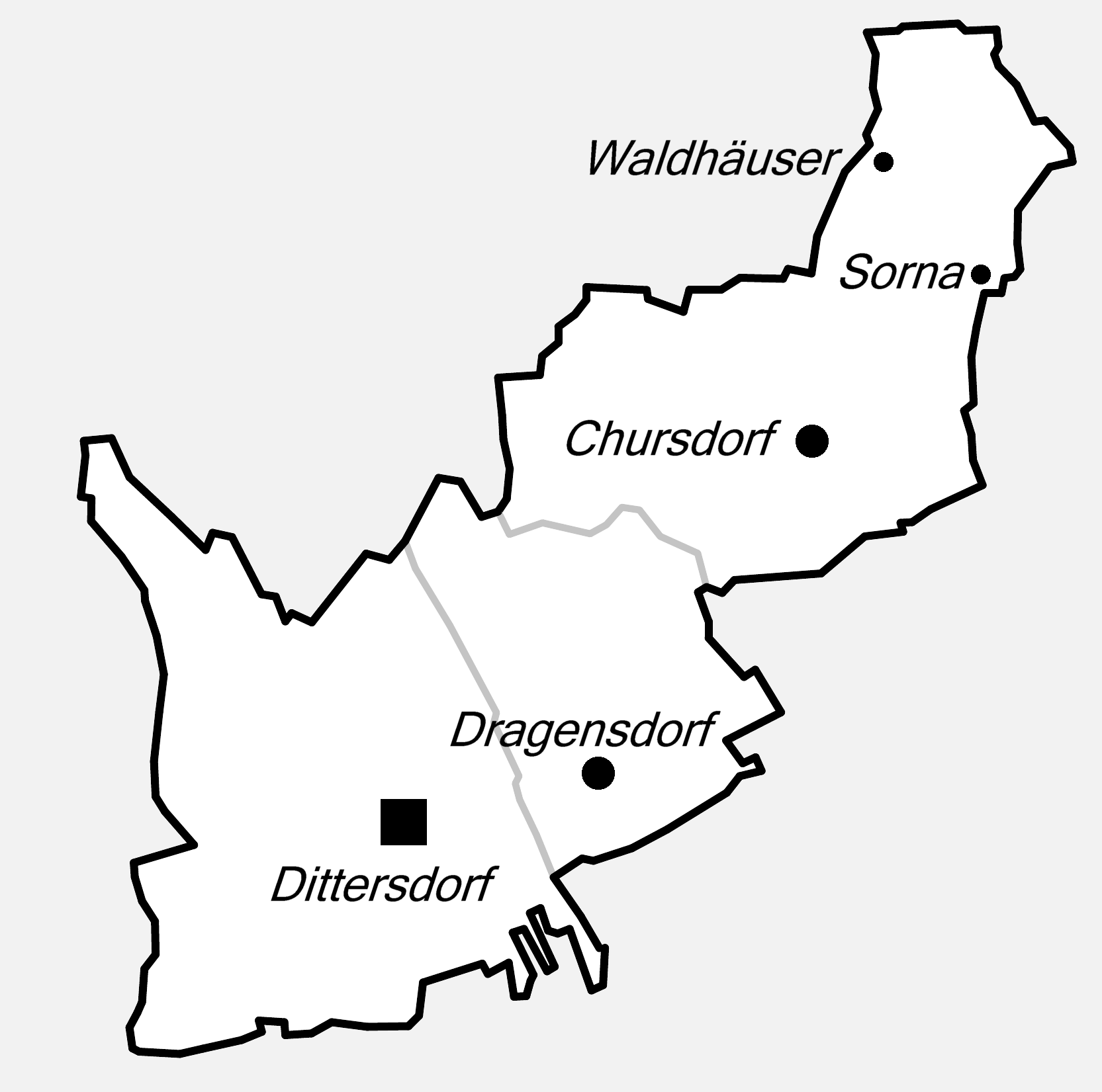 Dittersdorf, aktualisierte Gemeindegliederung